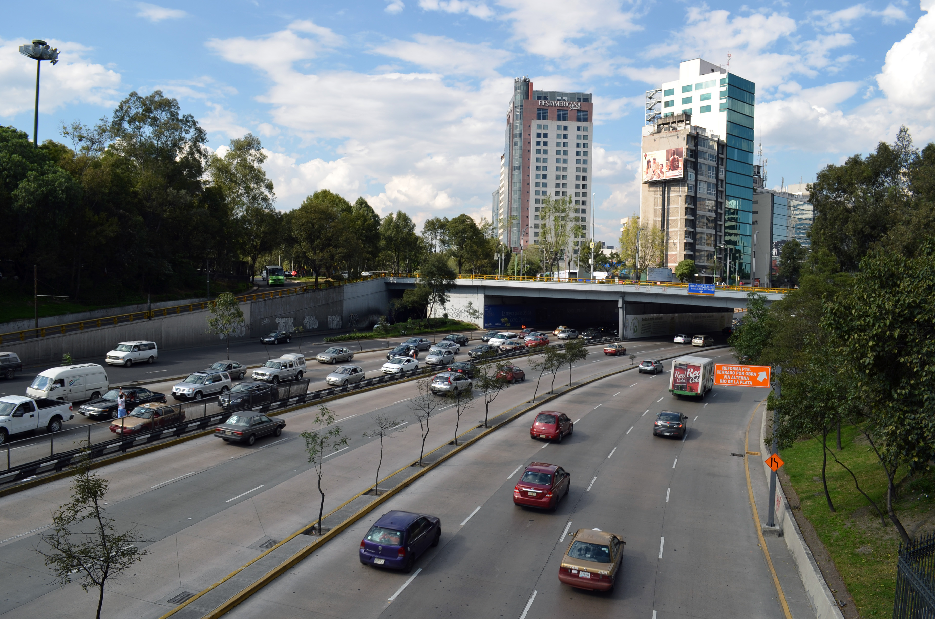 Circuito Interior Bicentenario Ciudad de México, a la altura del bosque de Chapultepec.